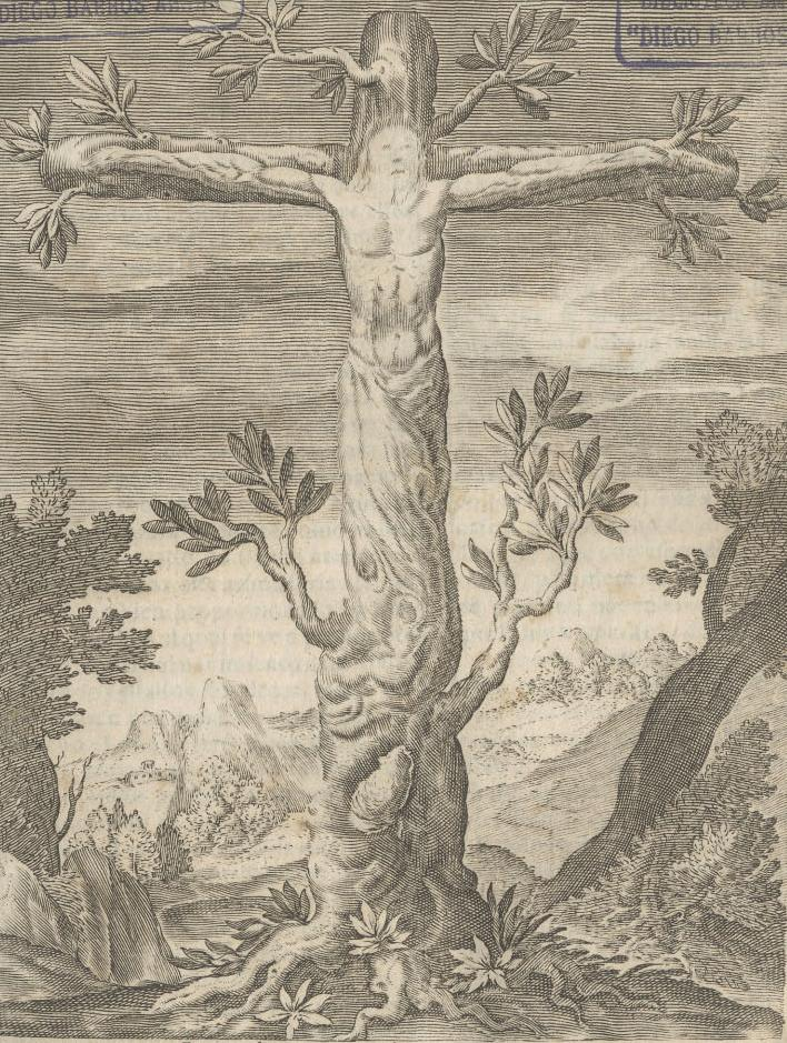 Grabado que reproduce el árbol en forma de cruz y crucifijo que se encontró en Limache en 1636.